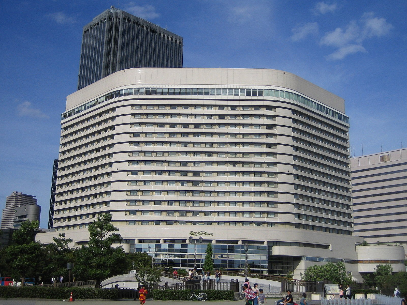 ホテルニューオータニ大阪 （大阪府大阪市中央区城見1-4-1） Hotel New Otani Osaka (Osaka Business Park, Osaka City, Japan) Photo by Mangos